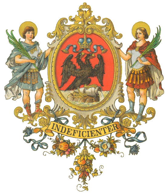 Wappen von Fiume/St. Veit am Flaum